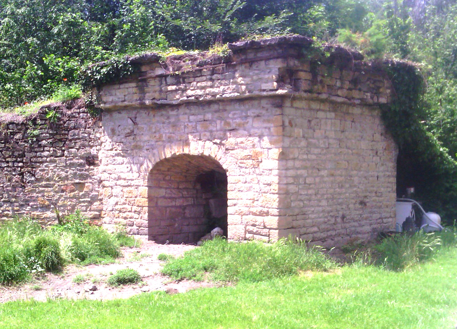 Four à chaux de Marcilly d'Azergues édifié en 1814